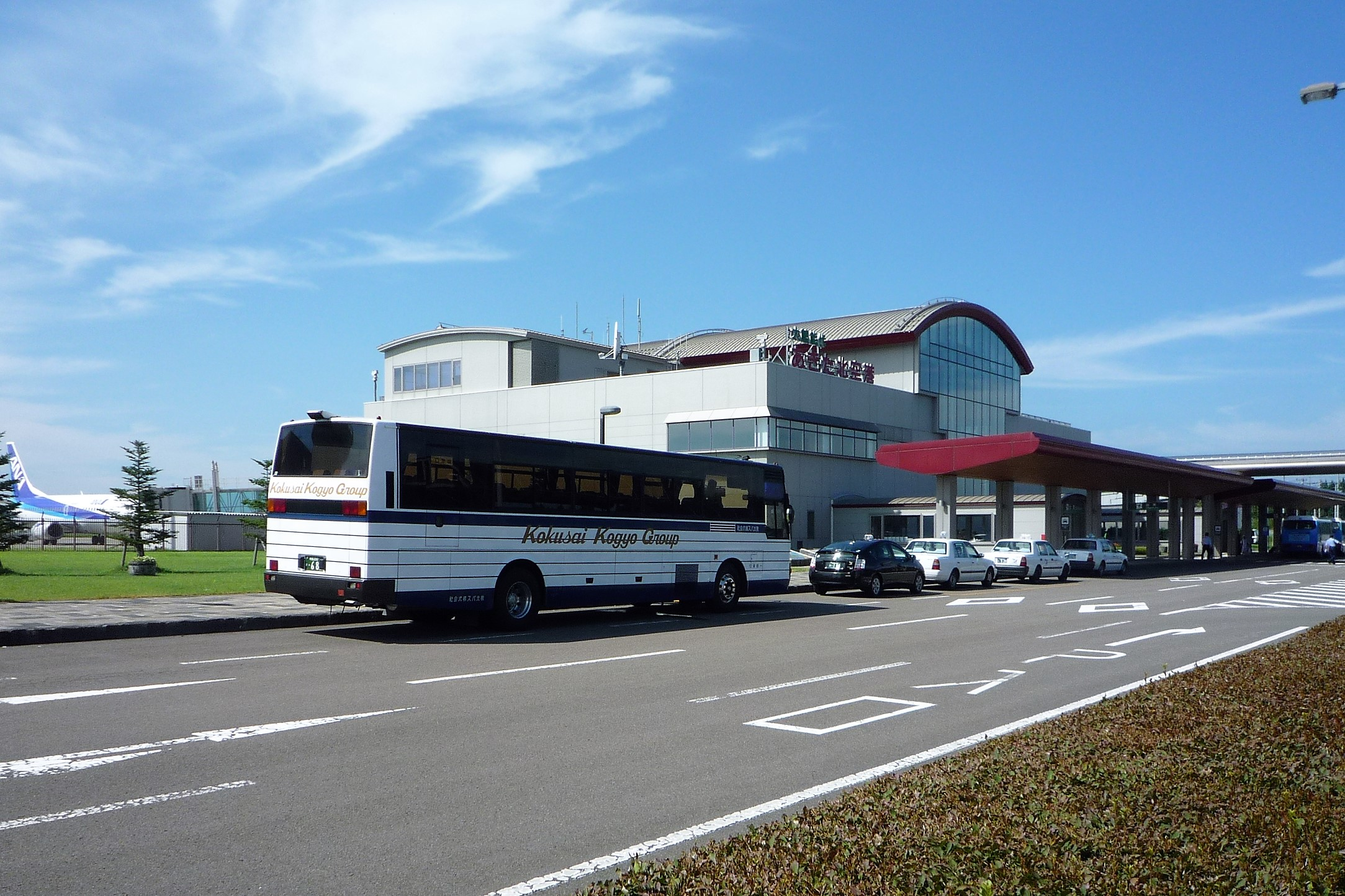 大館能代空港 旅客ターミナル